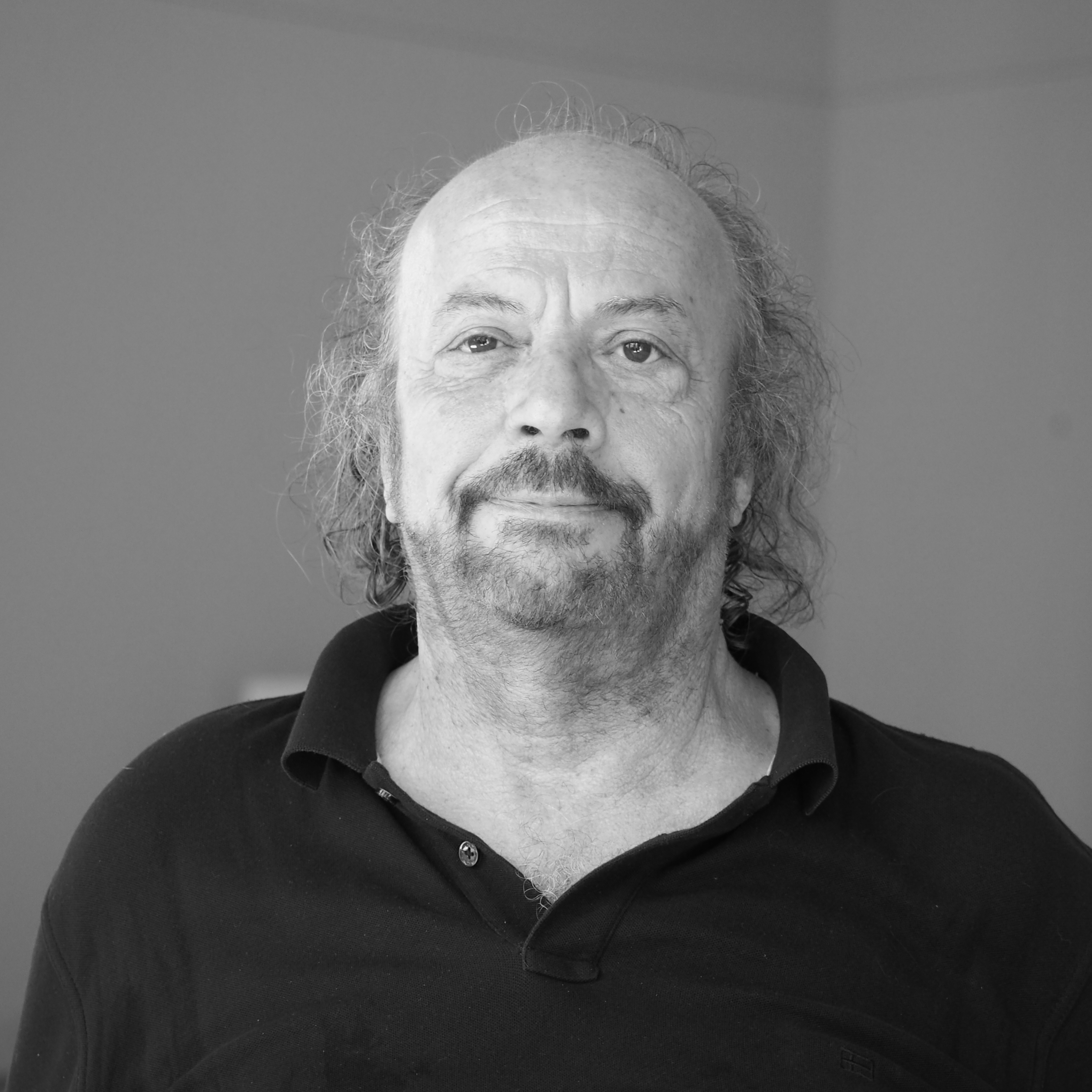 Farkas Tibor belsőépítész, a MABE elnökségi tagja Pesti Vigadó /V. ker Vigadó tér 1./ földszinti kiállítóterében 2019. augusztus 22-én.